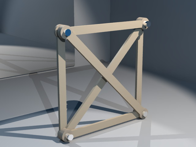 Voorbeeld van een statisch onbepaald vakwerk met één redundante verbinding. (Gebruikte software: Blender/YafRay).